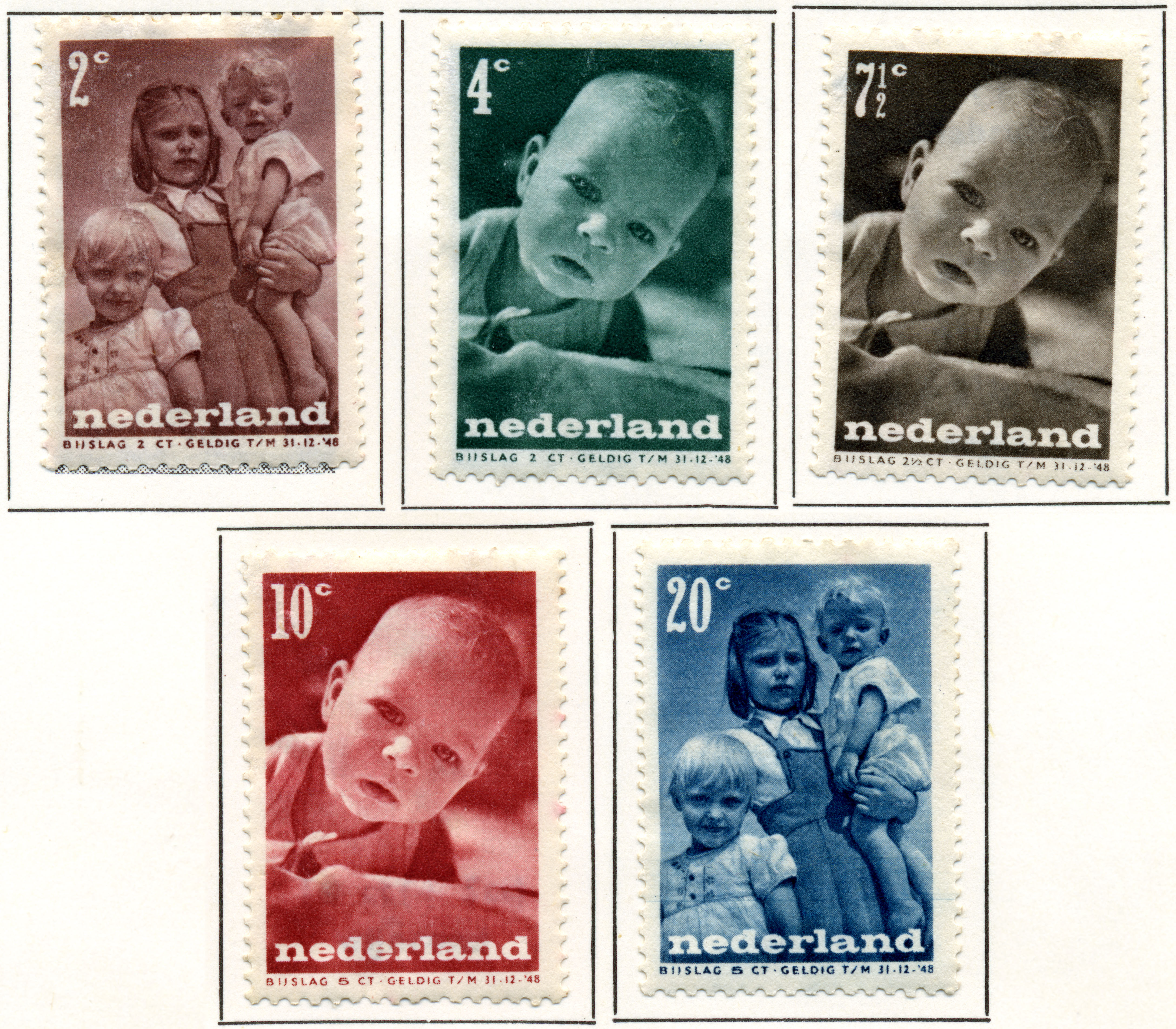 1947 Kinderzegels. NVPH nr 495-499. Ontwerp Eva Nesnyö (de foto's) en Wim Brusse (cijfers en letters)